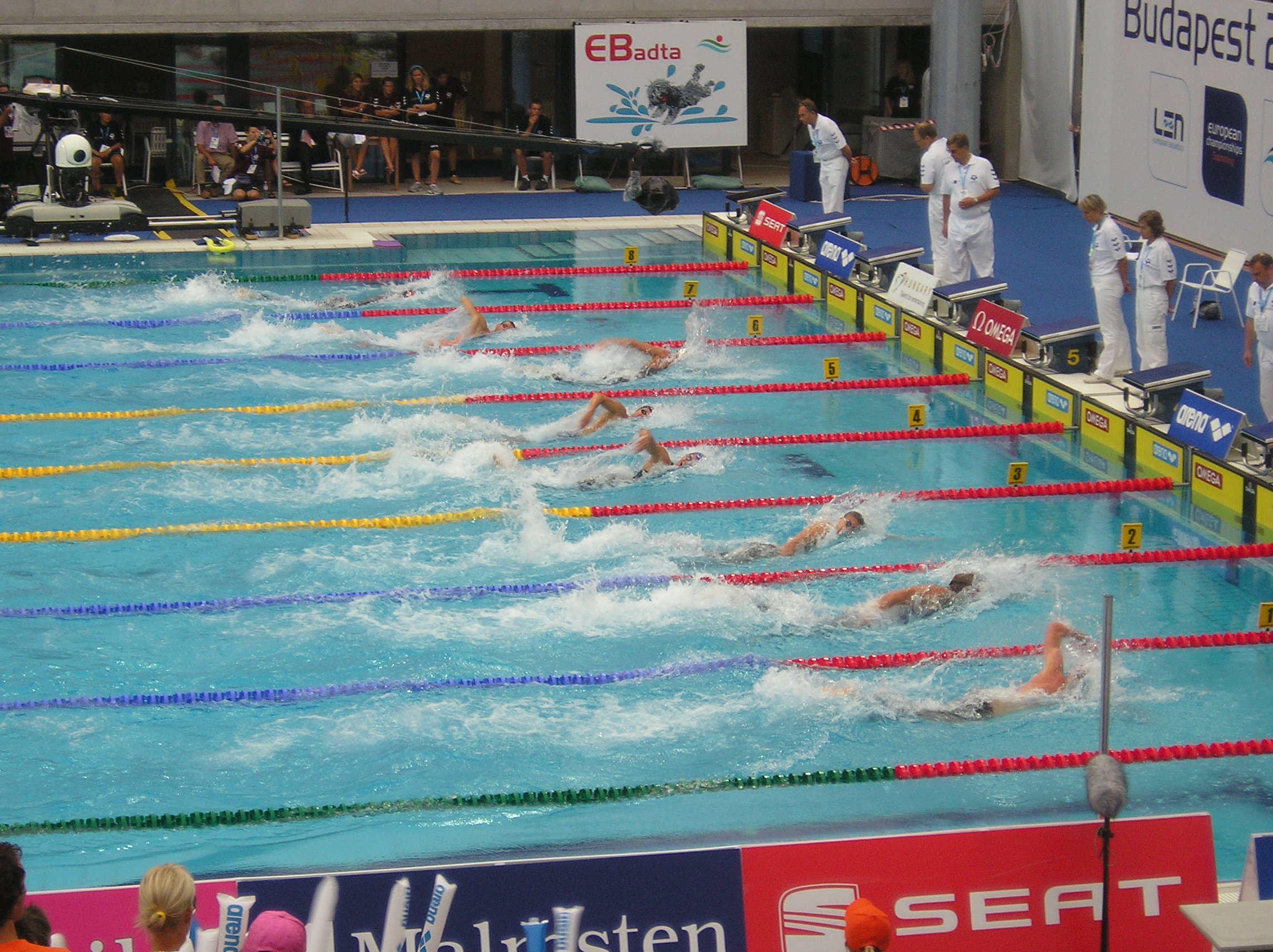 Halve finale 100 meter vrije slag mannen tijdens het EK Zwemmen 2006 in Boedapest. Pieter van den Hoogeband (Ned) in baan 5.